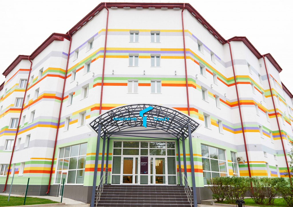 Kí túc xá của trường